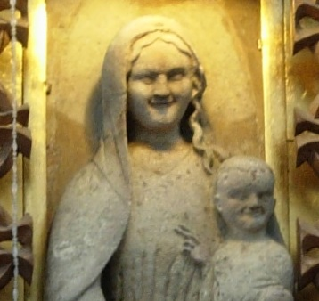 Madonna Łokietkowa, Wiślica